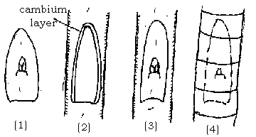 bud grafting